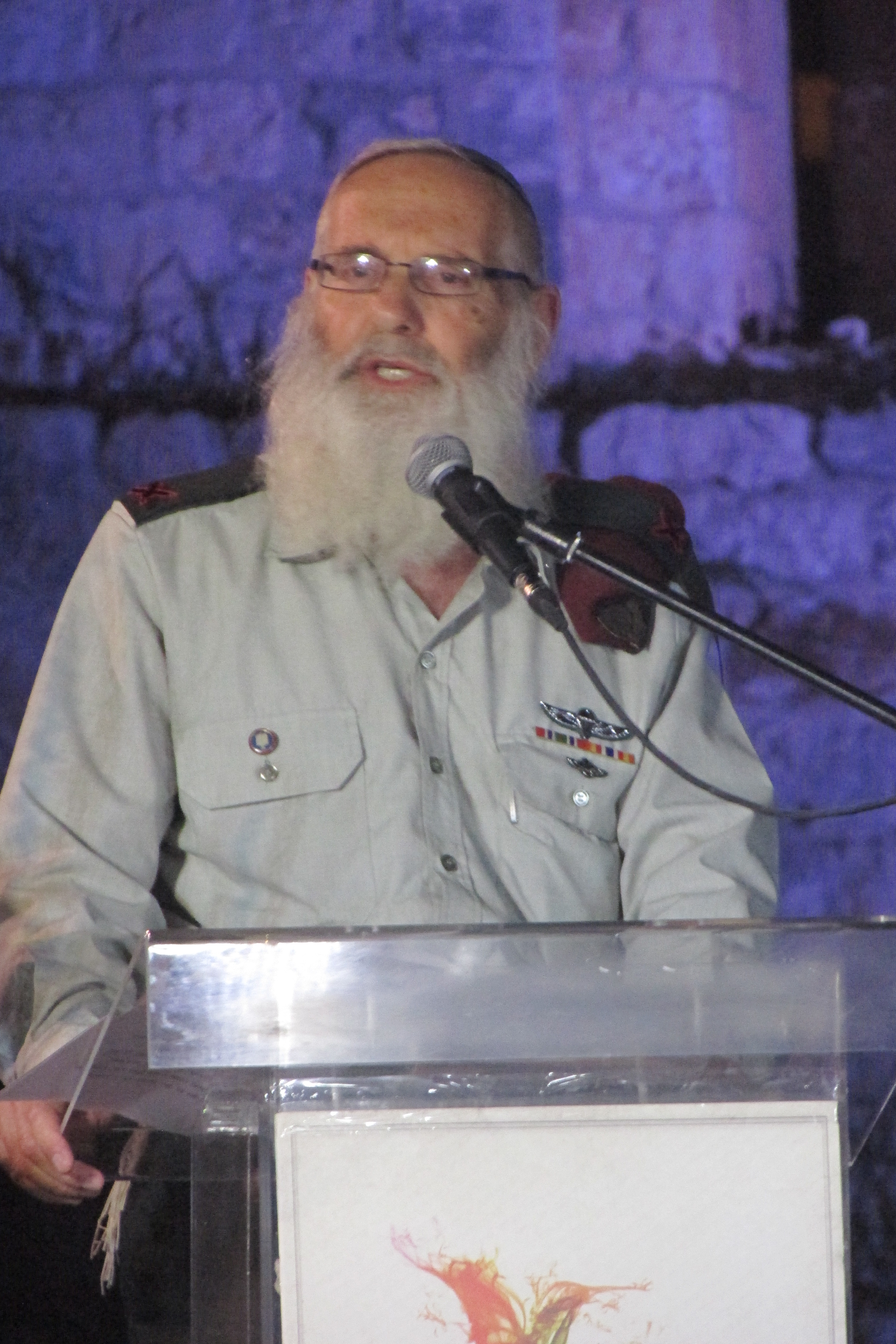 Eyal Karim